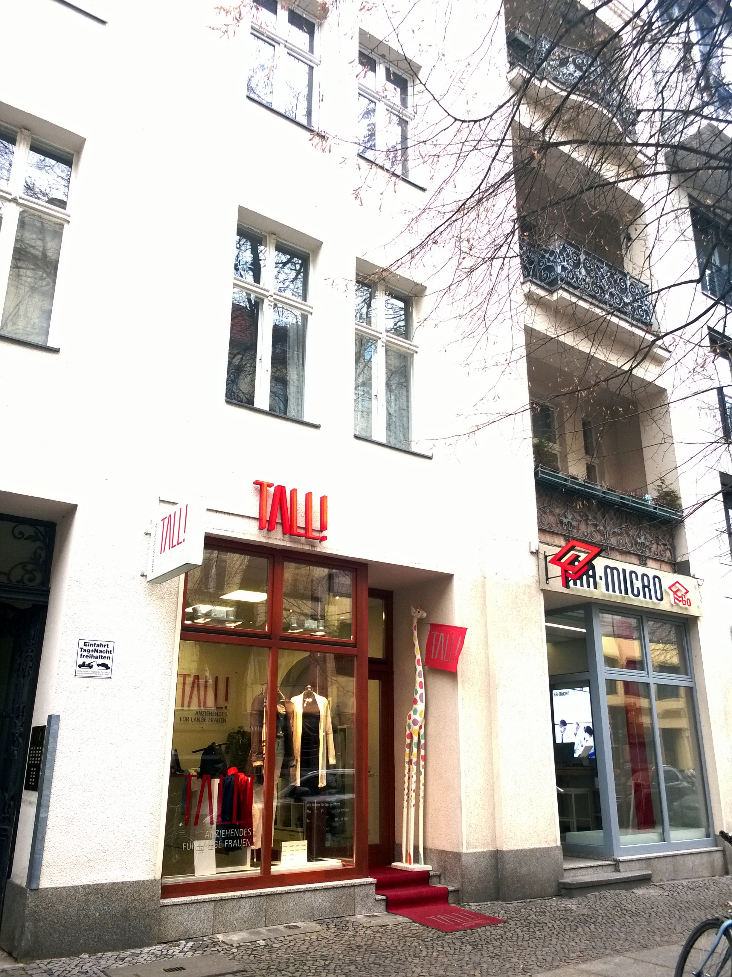 Charlottenburg Marburger Straße Ehemaliges Chez Nous